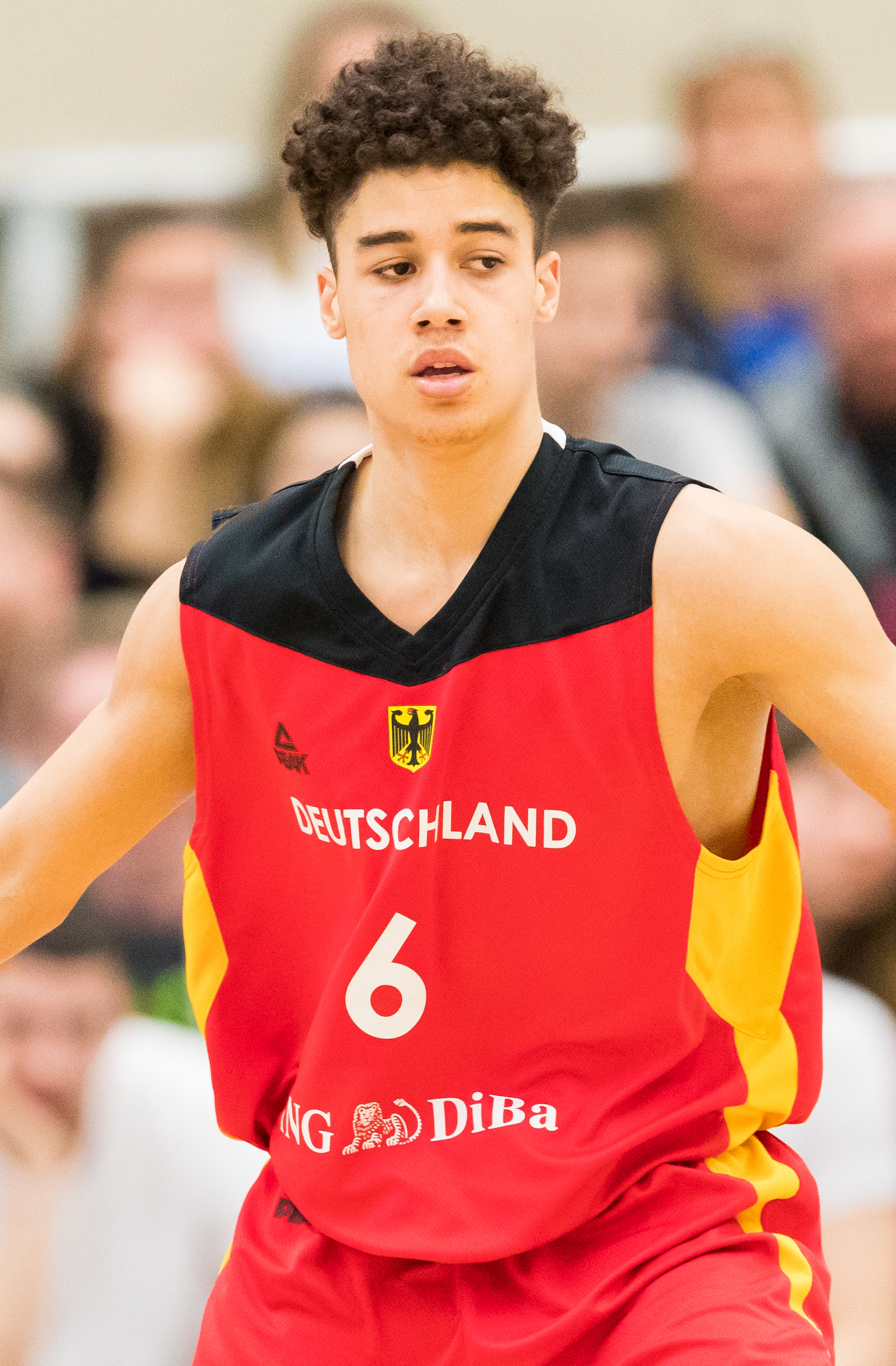 Germany vs Russia 80:75 during semi-final Basketball Albert Schweitzer Turnier at GBG Halle, Mannheim, Baden-Württemberg, Germany on 2018-04-06, Photo: Sven Mandel